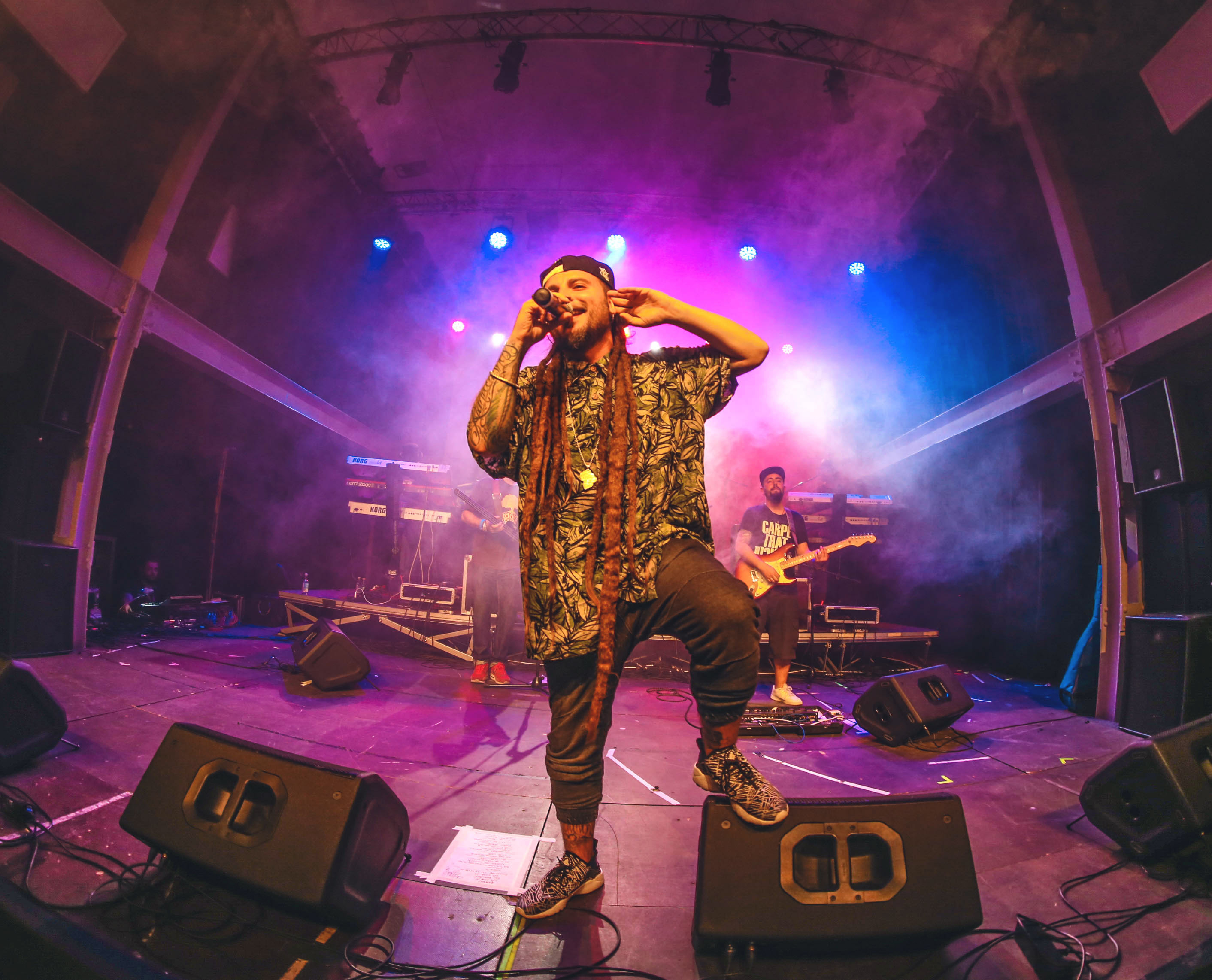 Green Valley en Valladolid